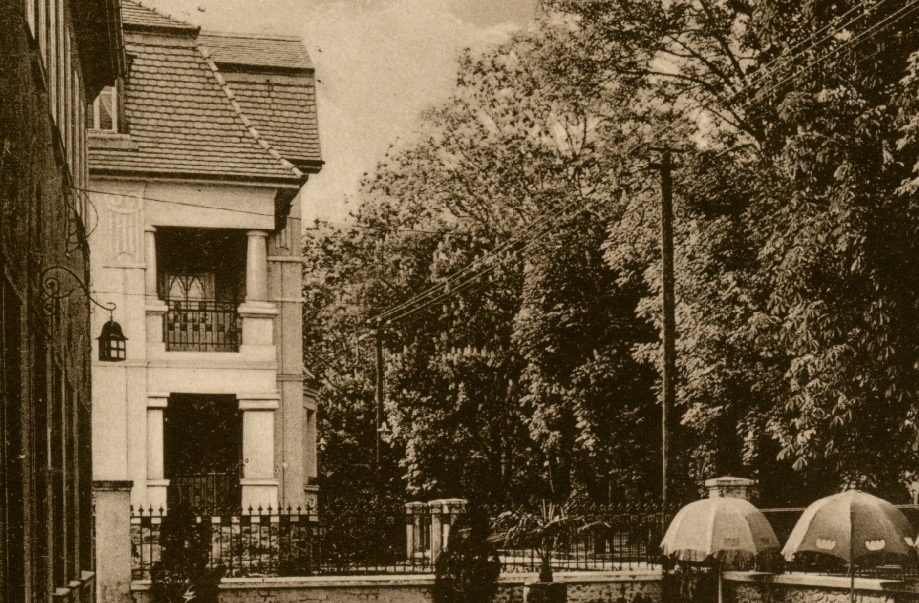 historická fotografie Villy Westend z pohledu od Orfea